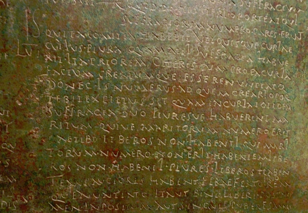 Lex Malacitana Chapter LVI